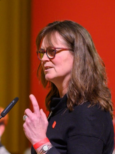 Zuschnitt des Bildes von Juliane Kleemann auf dem SPD-Landesparteitag Sachsen-Anhalt 2020